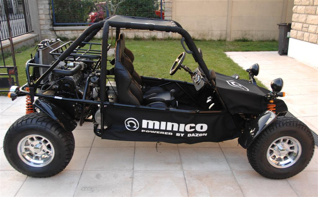 Vue de profil du buggy Dazon 1100